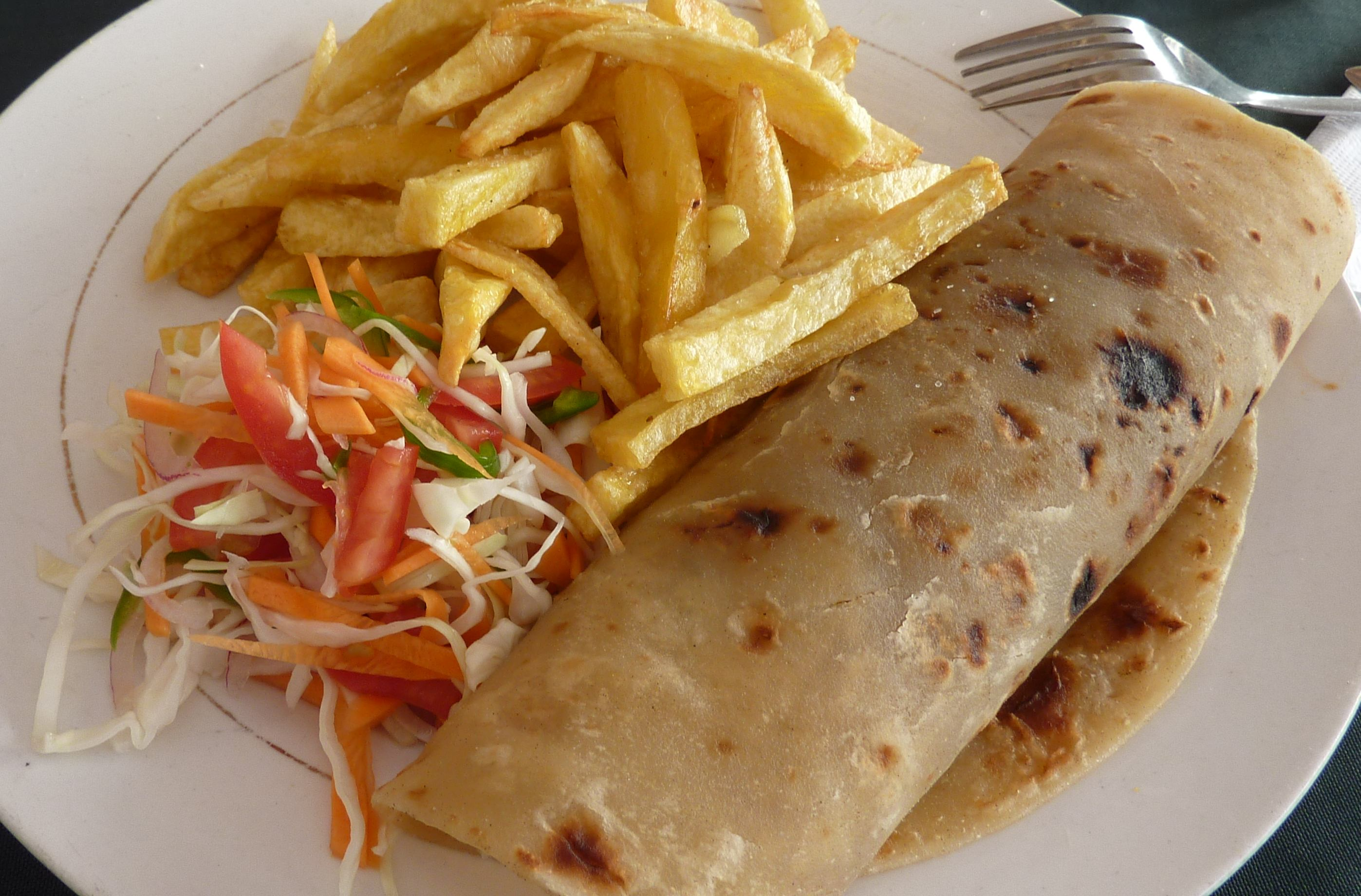 comida realizada en casa